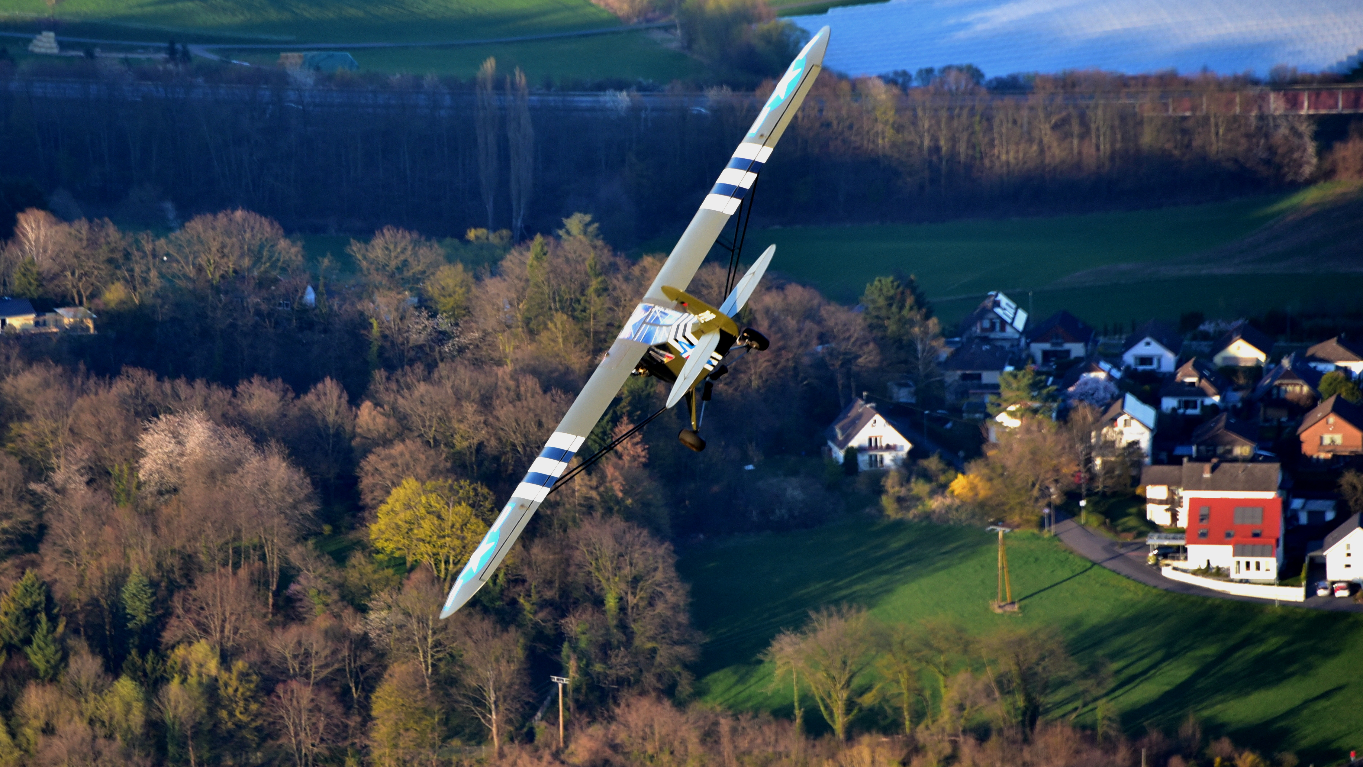 Flugzeug, Piper L-4